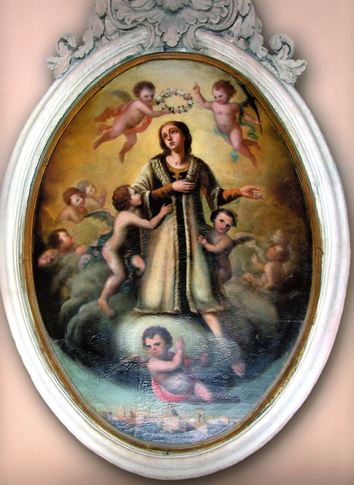 Il quadro,un olio su tela di cm 180x120, si trova nell'abside della Chiesa patronale di San Quintino. Fa parte di un ciclo di cinque dipinti di forma ovale dedicati al santo patrono, uno dei quali firmato GIO.BATTA.LAMA, .